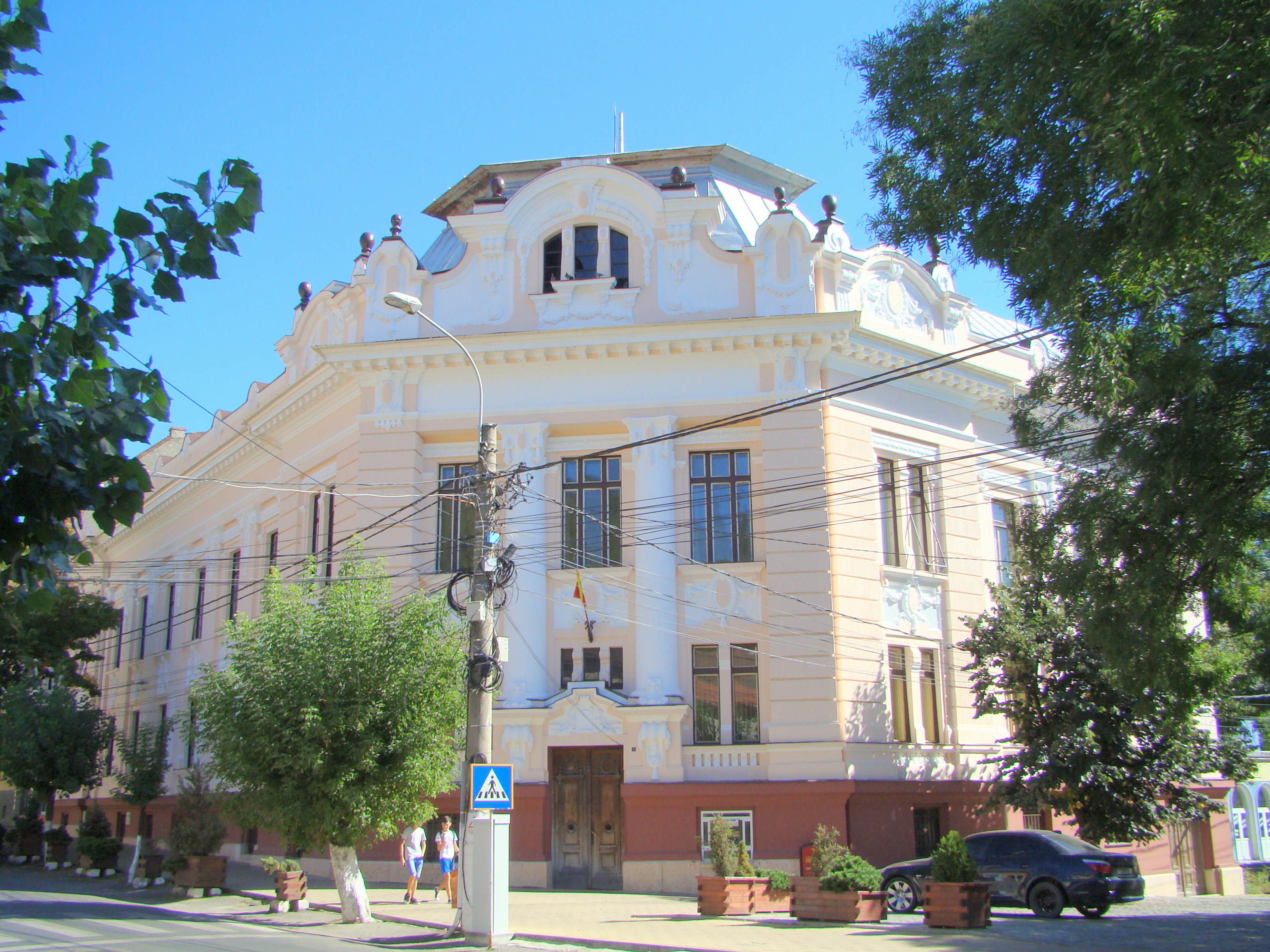 „Banca Silvania”, azi Judecătoria, oraș Șimleu Silvaniei, Piața Maniu Iuliu 1, colț cu 1 Decembrie 1918